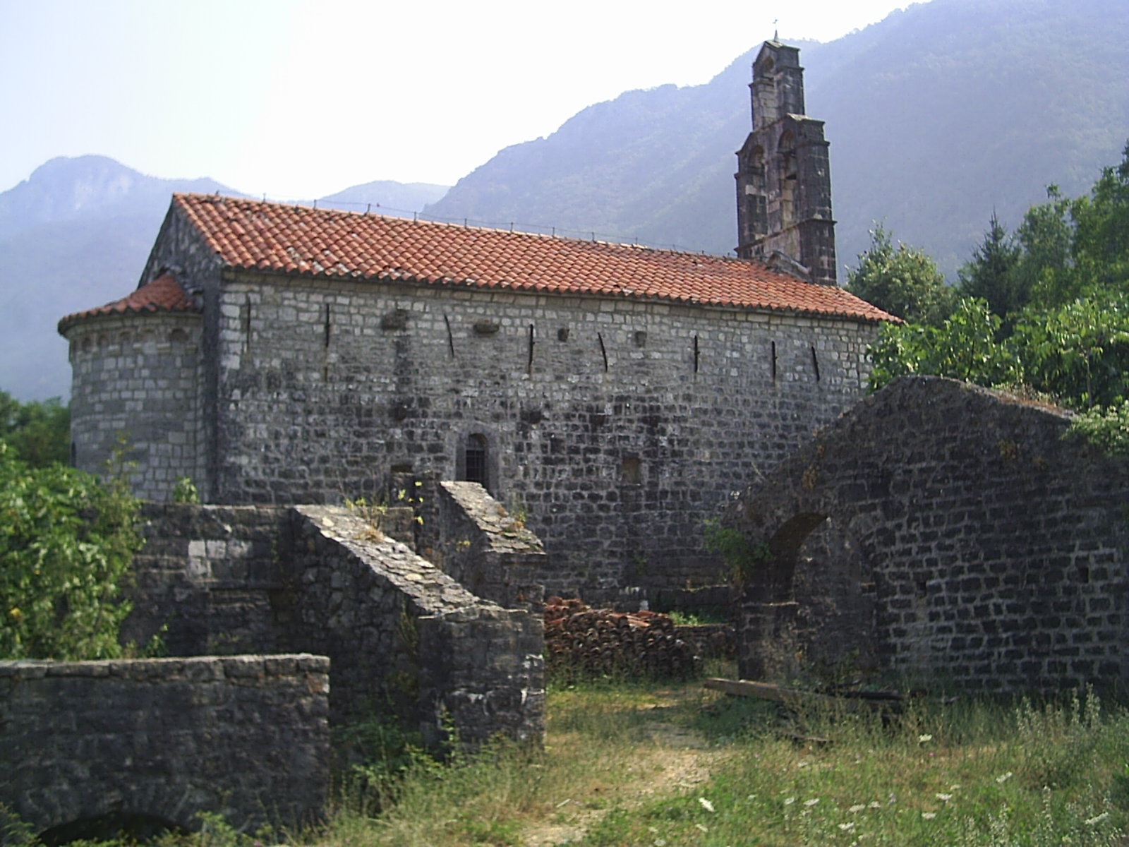 Монастырь Дольние Брчели